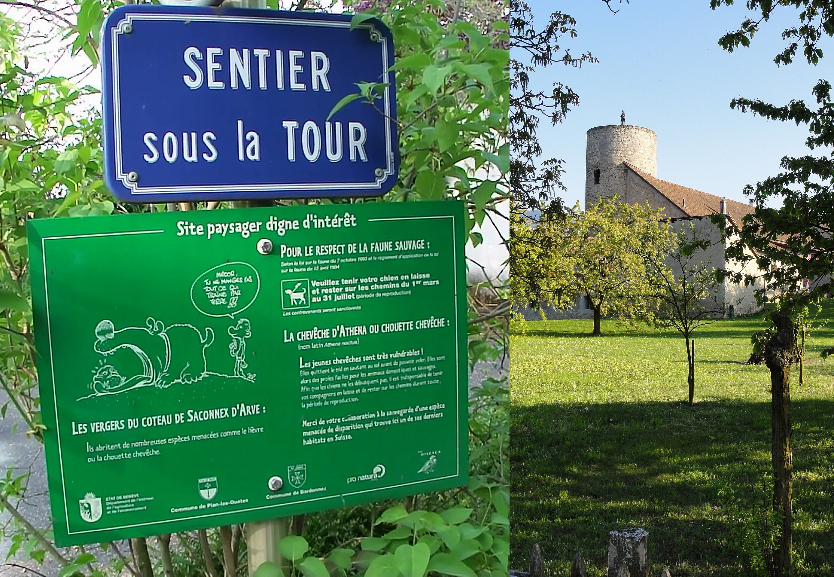 Sentier sous la Tour "Les Vergers du Coteau de Saconnex d'Arve" Communes de: Plan-les-Ouates et Bardonnex à Genève